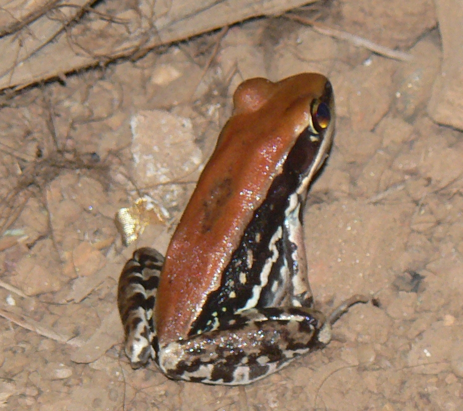 Hydrophylax malabaricus syn. Hylarana malabarica. Vagator, Goa, India.